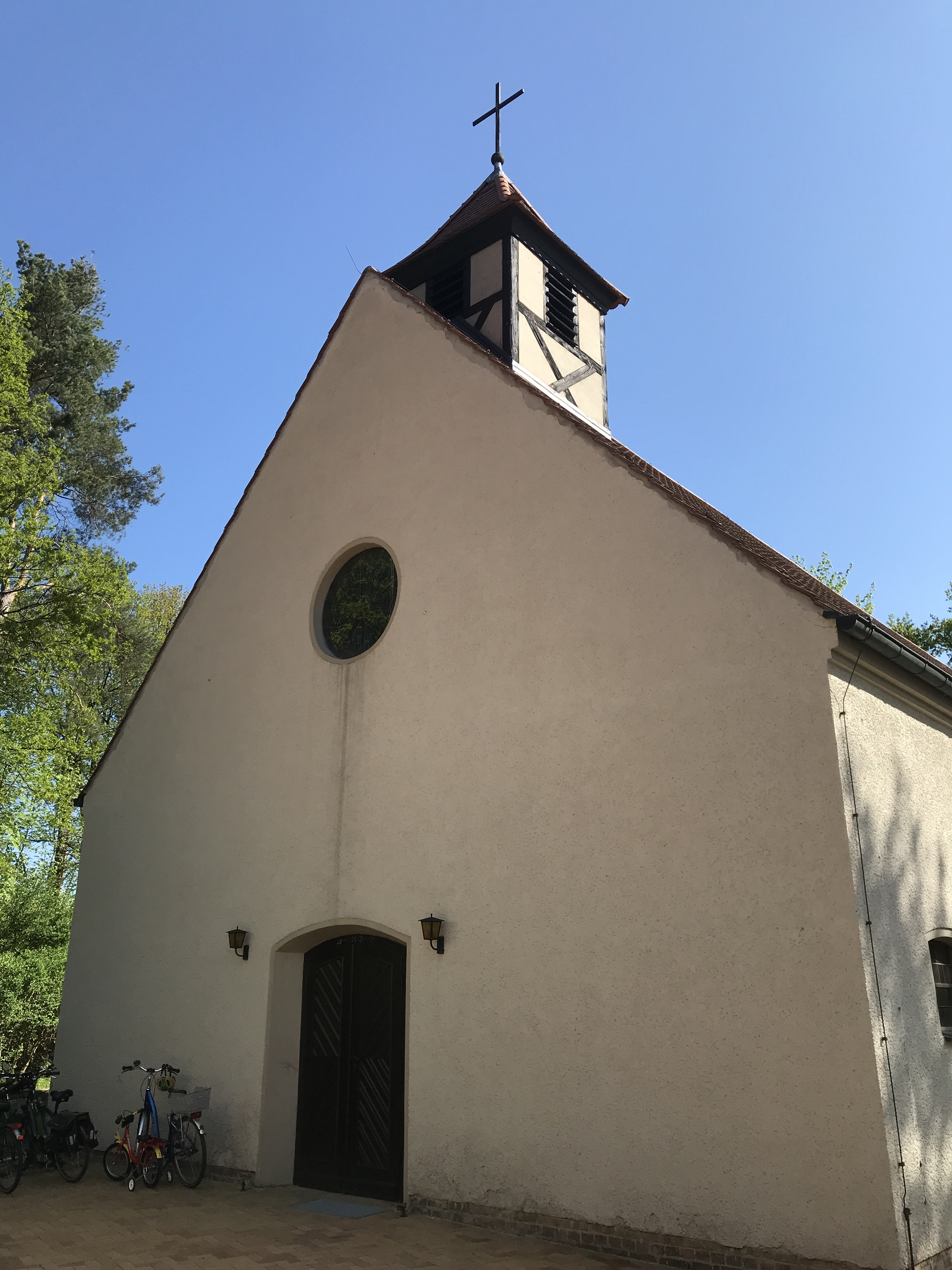 Die Michaeliskirche in Ludwigsfelde entstand in den Jahren 1953 bis 1955 nach einem Entwurf des Kirchenbaurates Winfried Wendland.